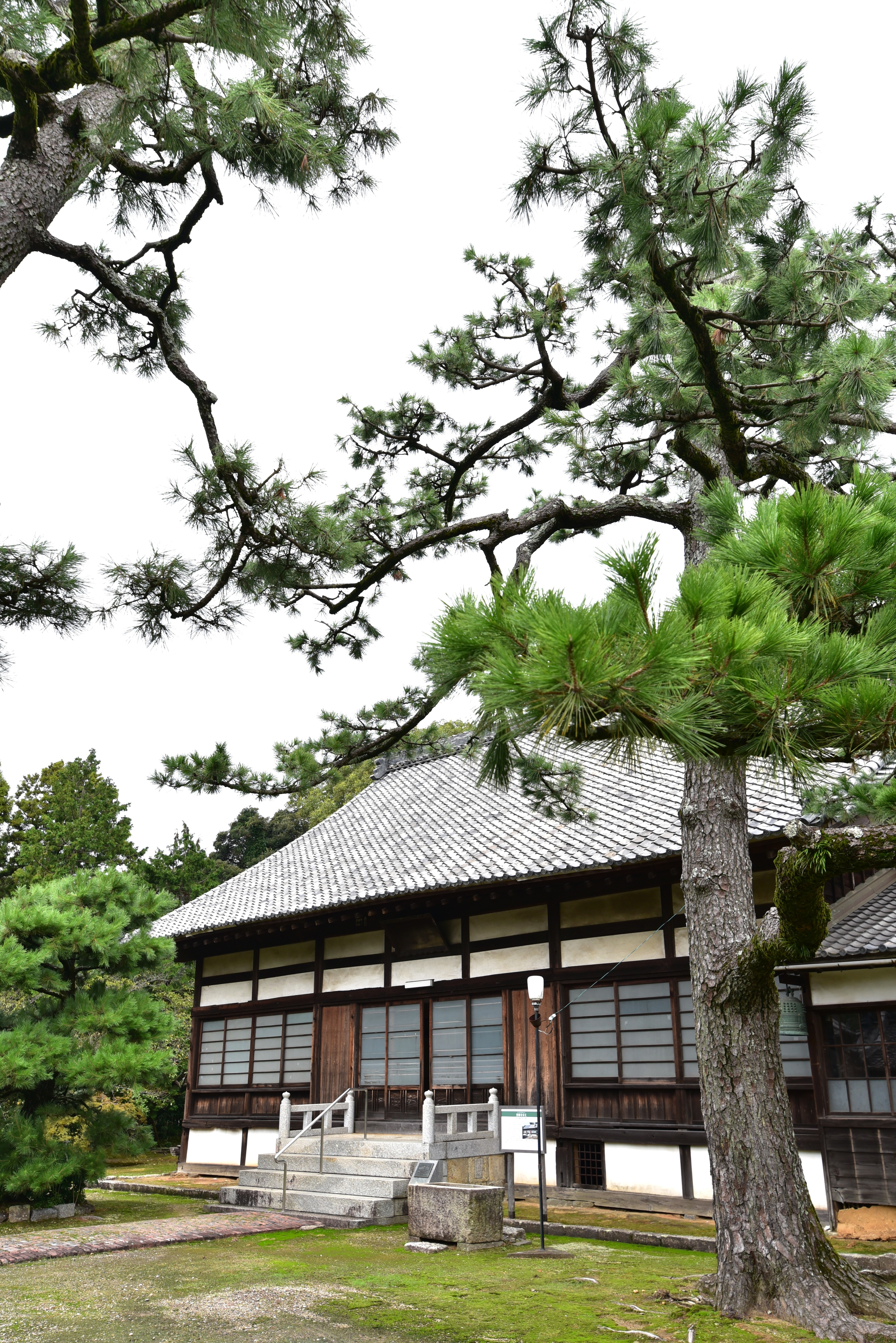 実相寺本堂